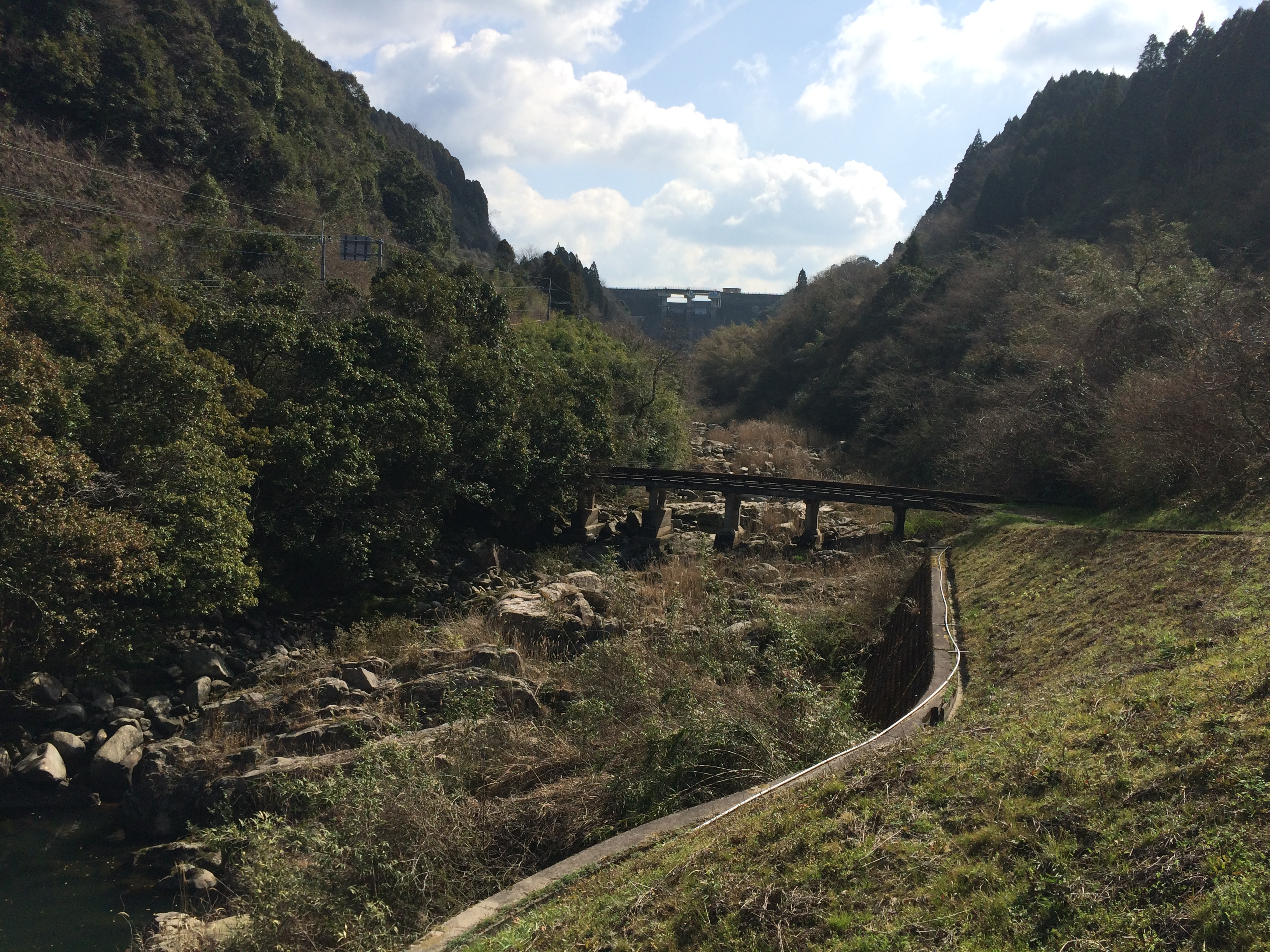 佐賀県佐賀市富士町大字関屋からの遠景